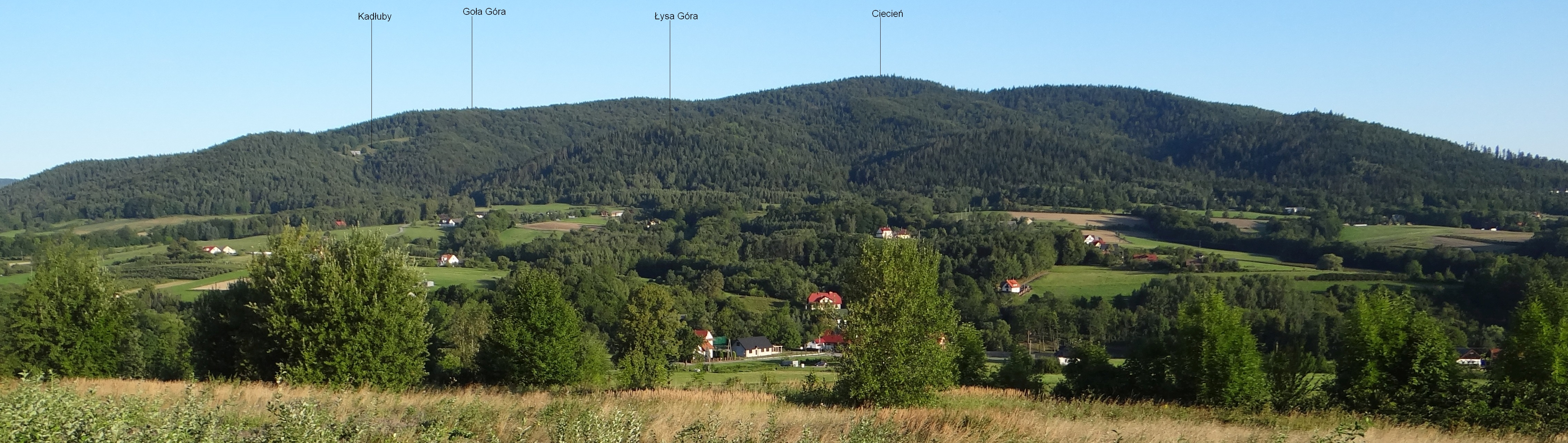 Ciecień od strony Skrzydlnej